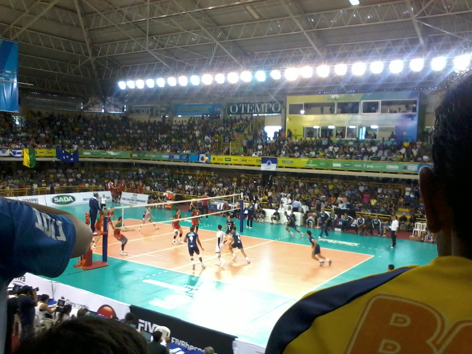 Final do Campeonato Mundial de Clubes de Voleibol Masculino de 2013 entre Sada Cruzeiro e Lokomotiv Novosibirsk (Ginásio Divino Braga, Betim)